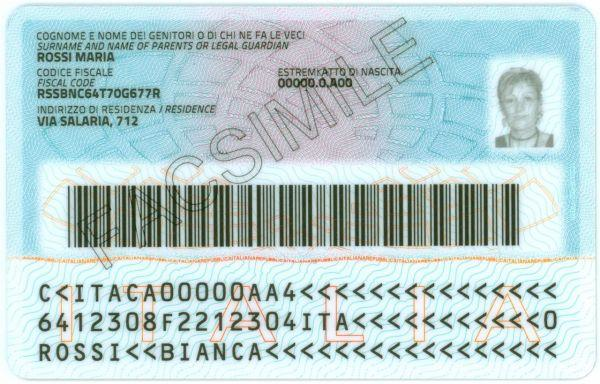 Fac-simile del retro della nuova Carta d'identità elettronica (CIE) introdotta a partire dal 2016